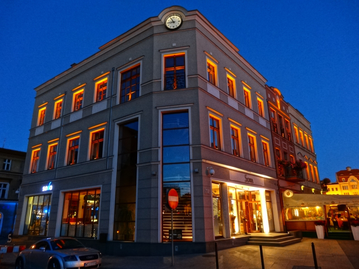 Ulica Mostowa w Bydgoszczy